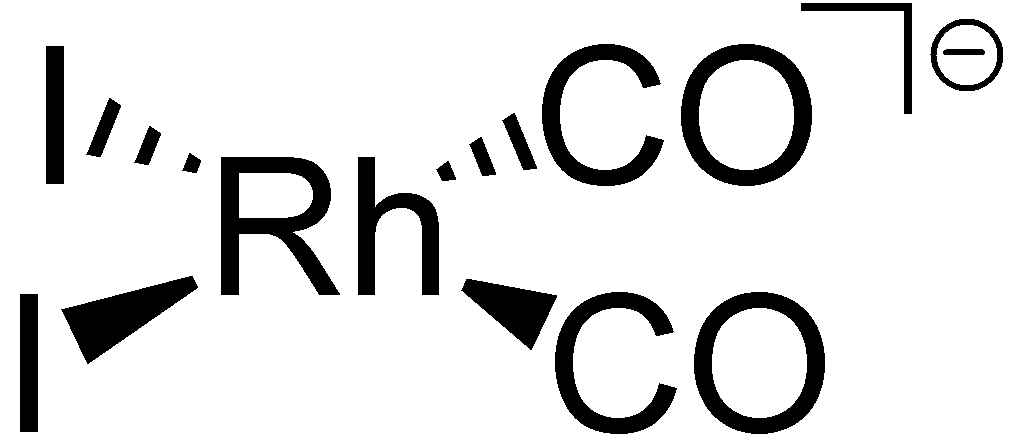 Struktur des Monsanto-Katalysators